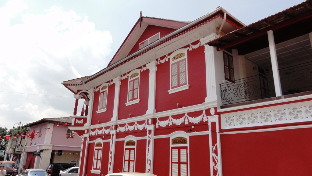 Jalan Tan Hiok Nee